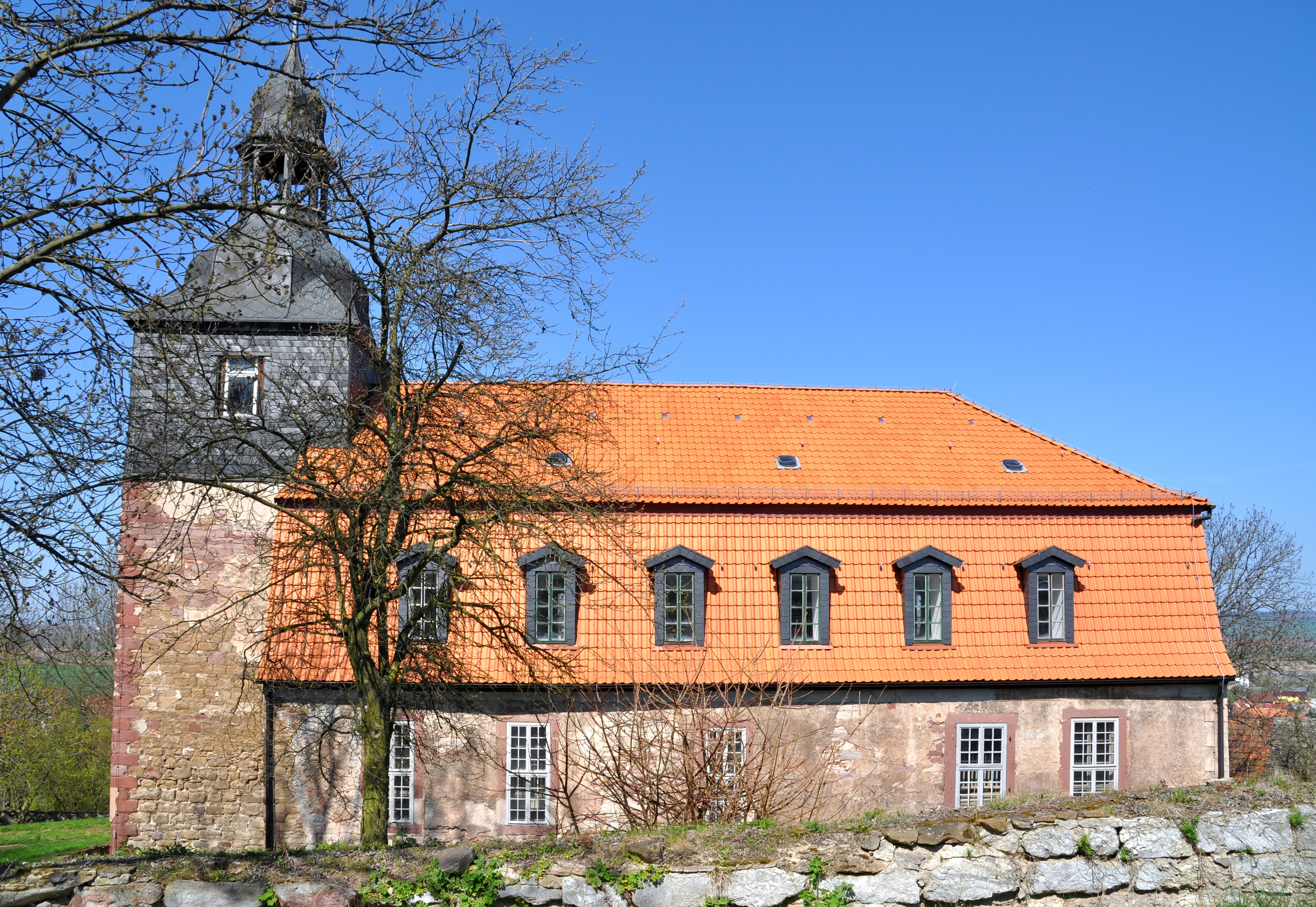 Kirche in Auleben von der hangseite gesehen